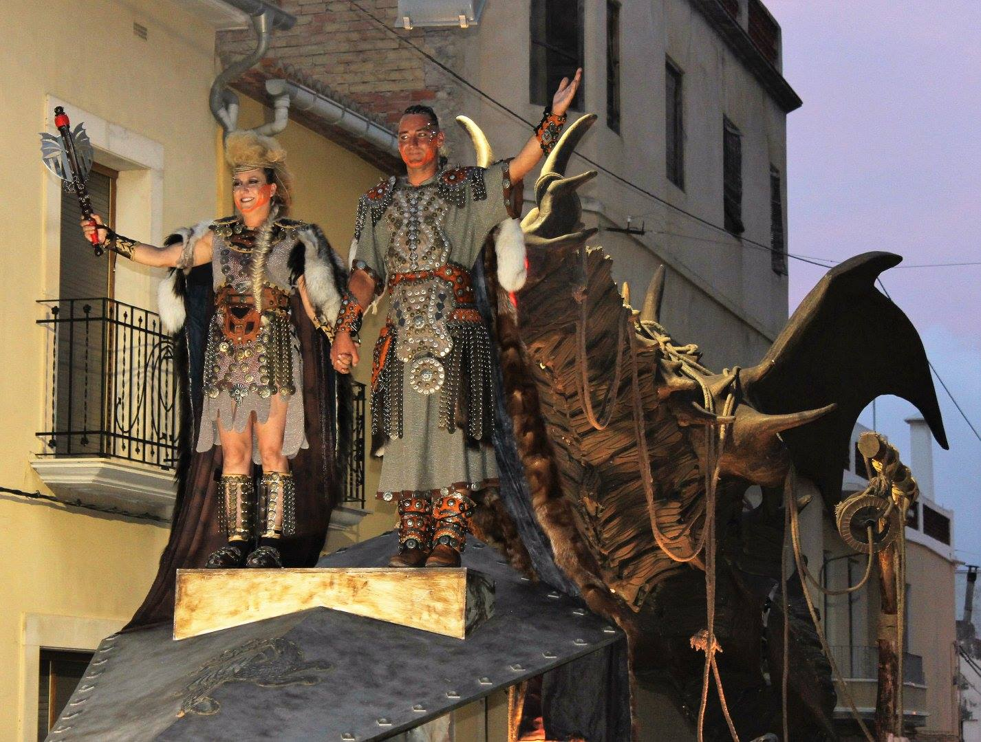 Moros y Cristianos de Pego This is a photography of a Folklore festival in Spain (Wikidata id Q23663045).